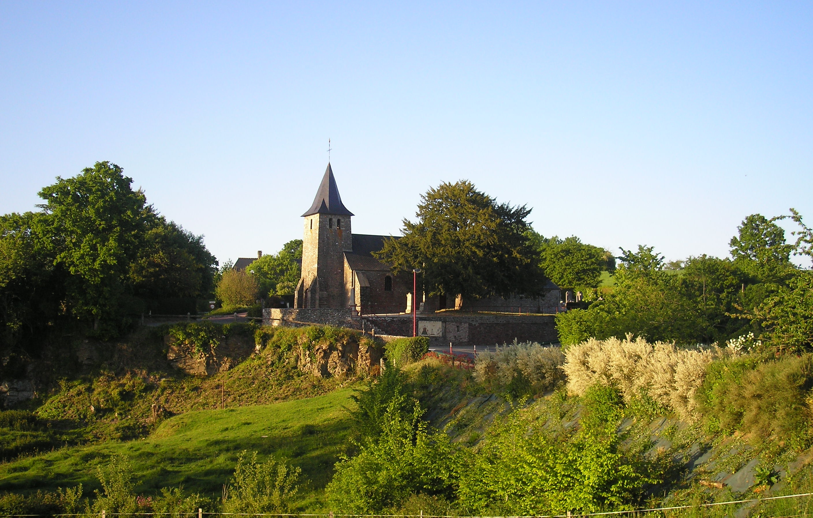 Brectouville (Normandie, France). Vue sur l'église Saint-Pierre.